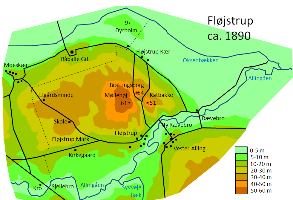 Fløjstrup, Randers Kommune, Danmark, bebyggelse ca. 1890.